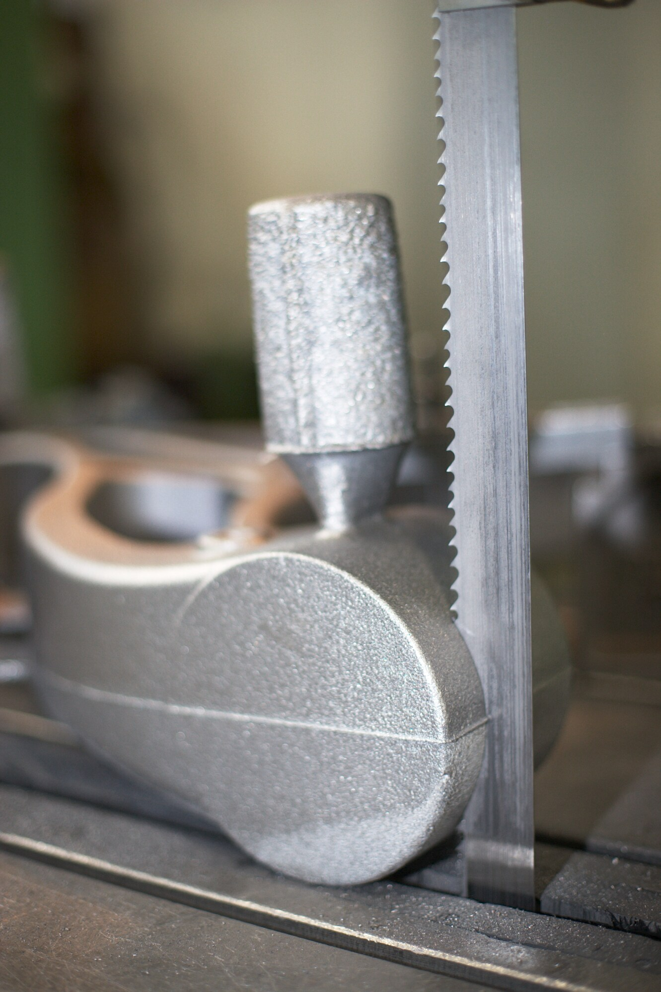 Sägen eines Gußstücks, Kontrolle auf unerwünschte Lunkerbildung.